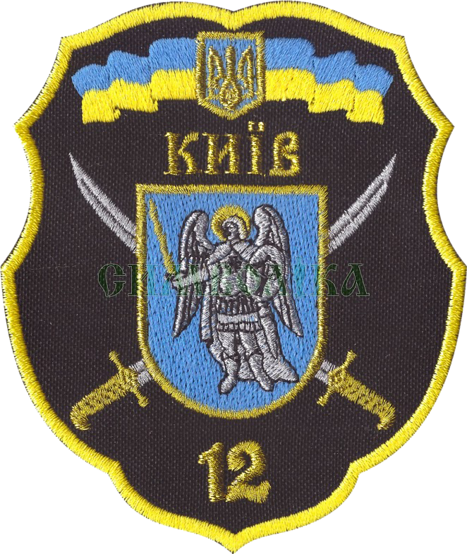 Нарукавний знак, 12 окремий моторизований піхотний батальйон